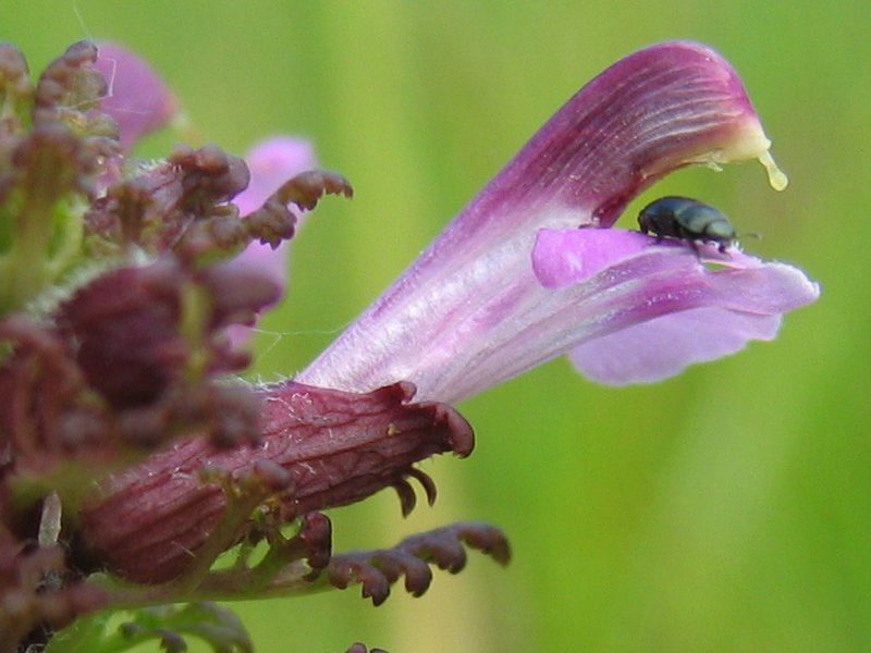 Sumpf-Läusekraut Pedicularis palustris, Müritz-Gebiet